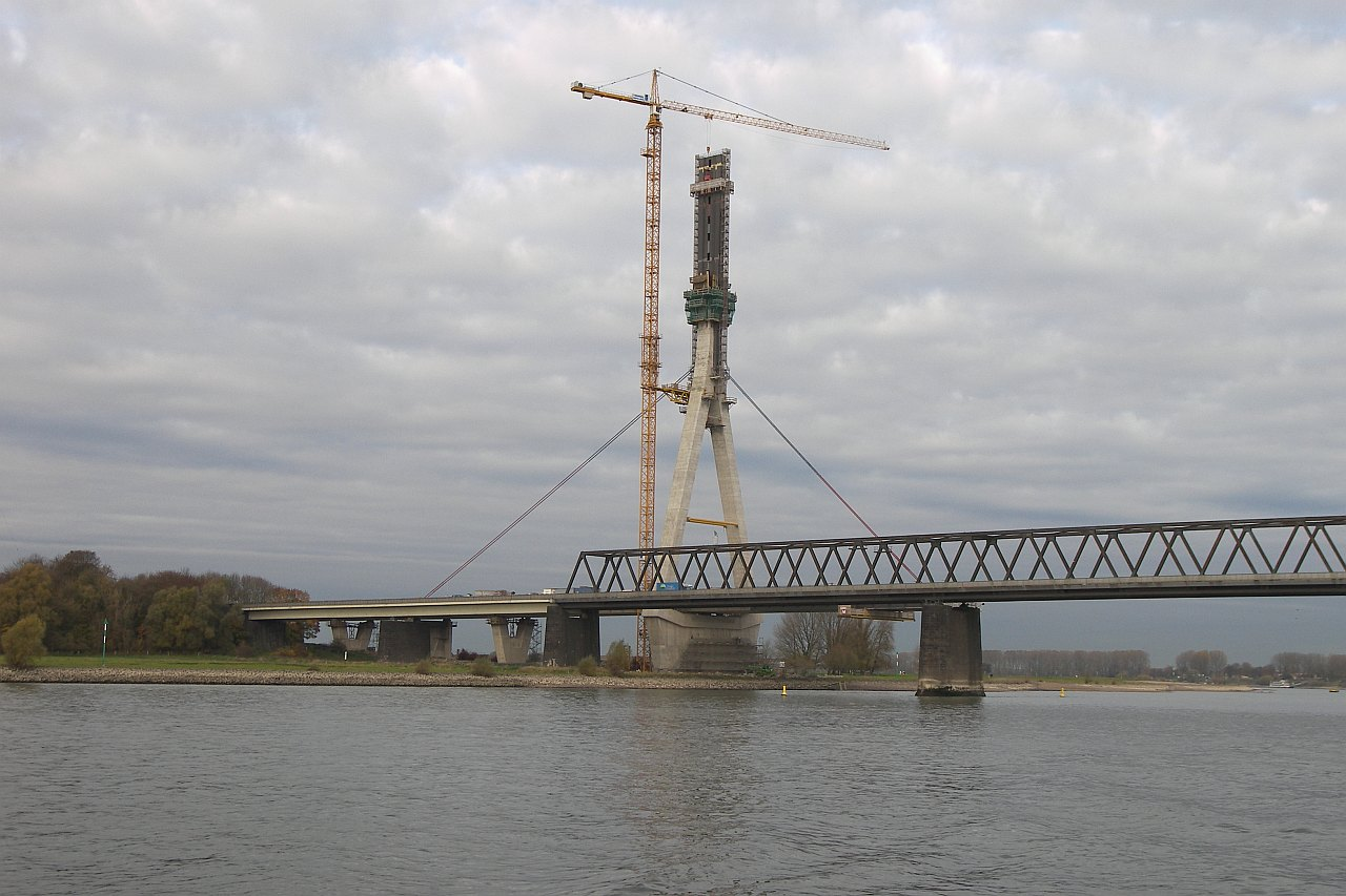 Neubau Weseler Straßenbrücke. Phylon der neuen Rheinbrücke in Wesel